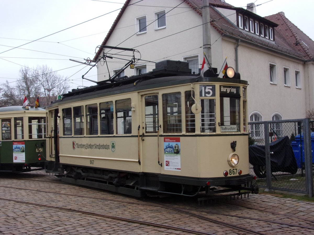 Triebwagen Nr. 867 der Nürnberg-Fürther Straßenbahn im Historischen Straßenbahndepot St. Peter